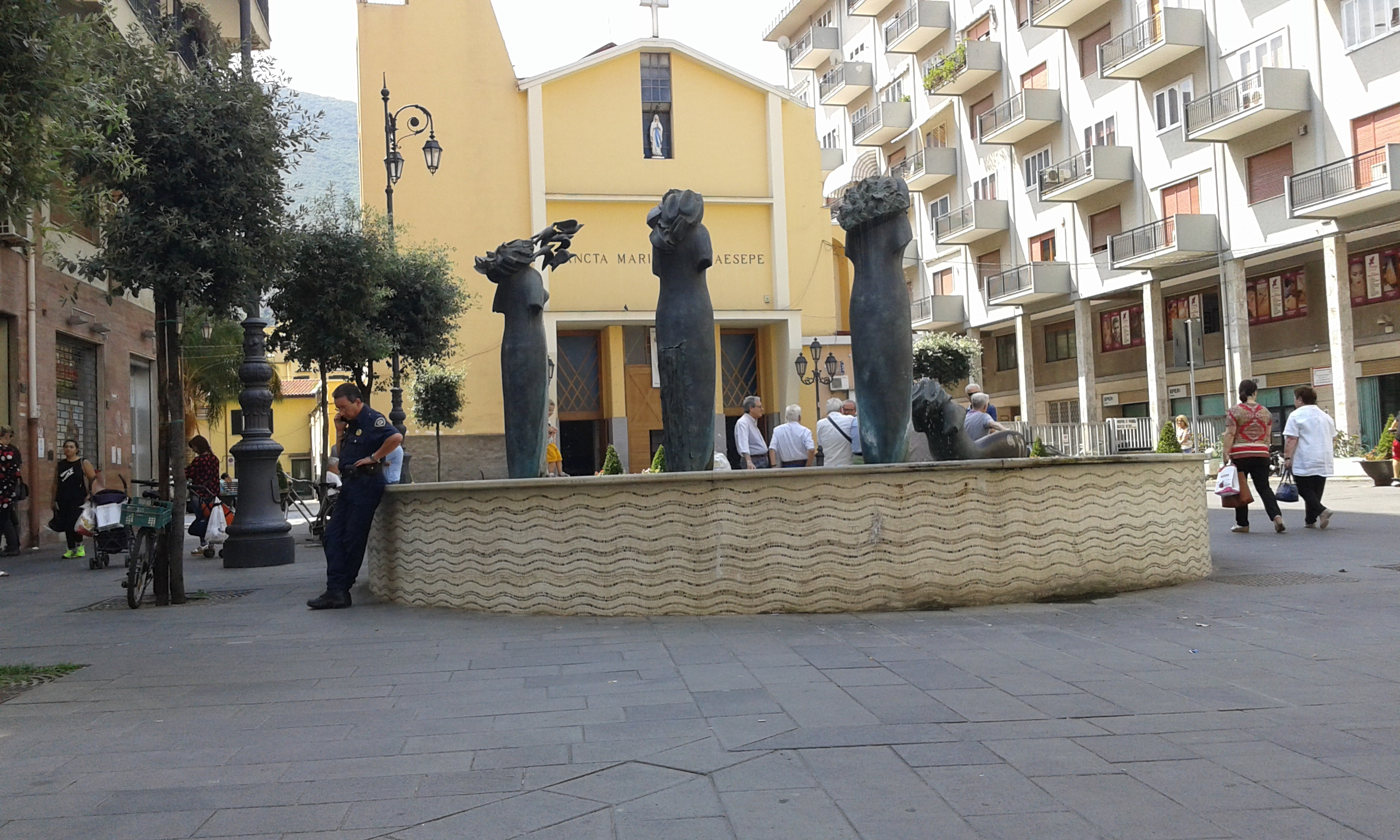 Chiesa Santa Maria del Presepe nota anche come Chiesa di Santa Monica